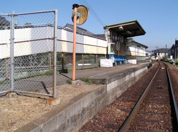 三木鉄道高木駅。2006年3月25日午後2時40分 (JST) ごろKouchiumiが撮影。‚